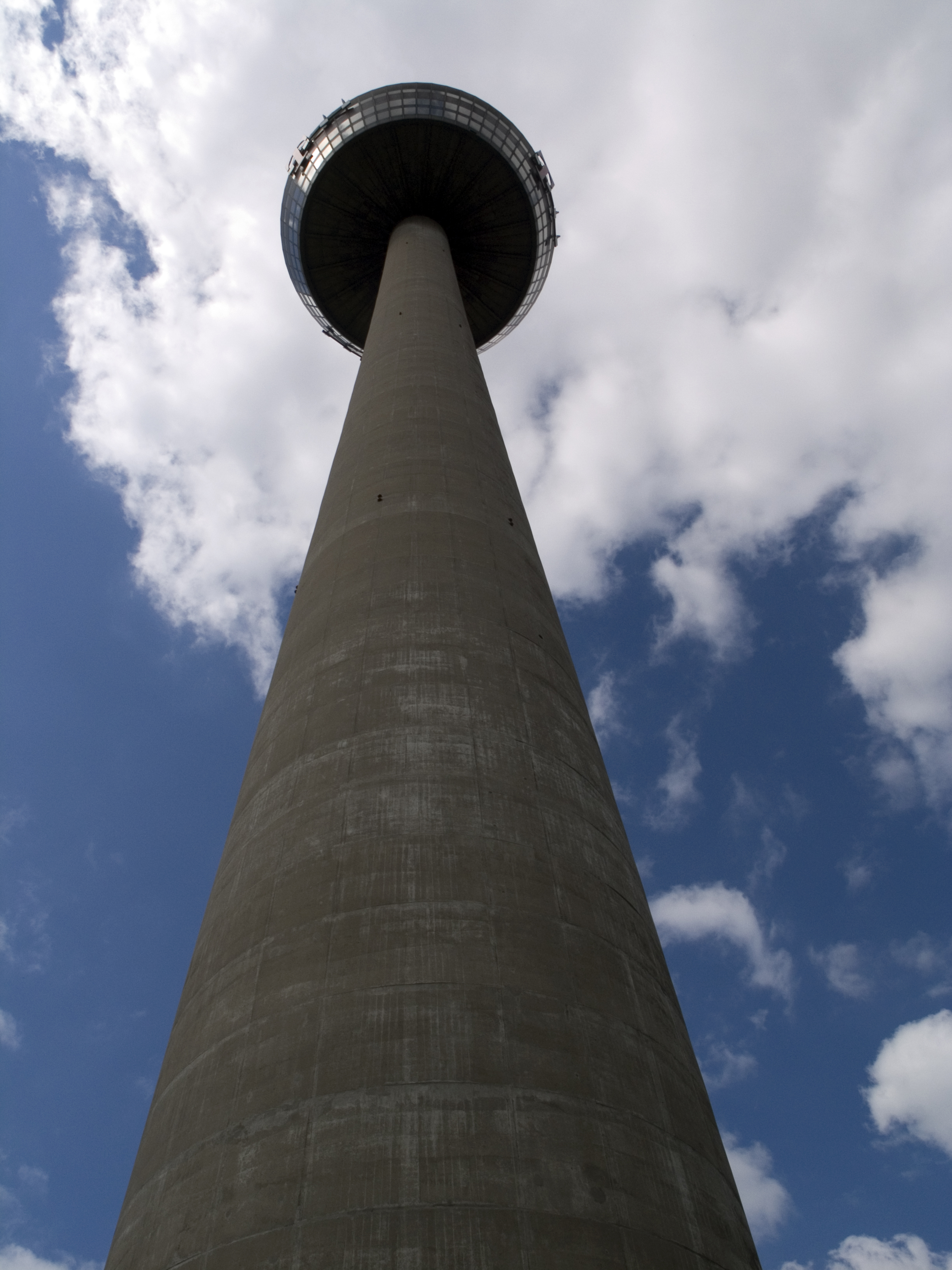 Северный Рейн-Вестфалия, Кёльн - телебашня Colonius